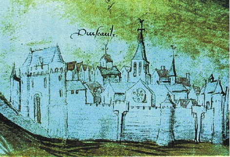 Alte Darstellung von Puiseaux (Frankreich) 1497.